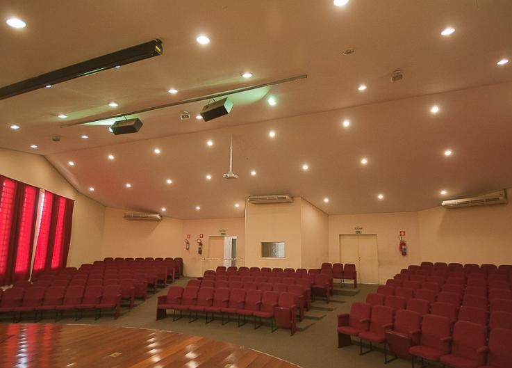 Auditório - Apresentação